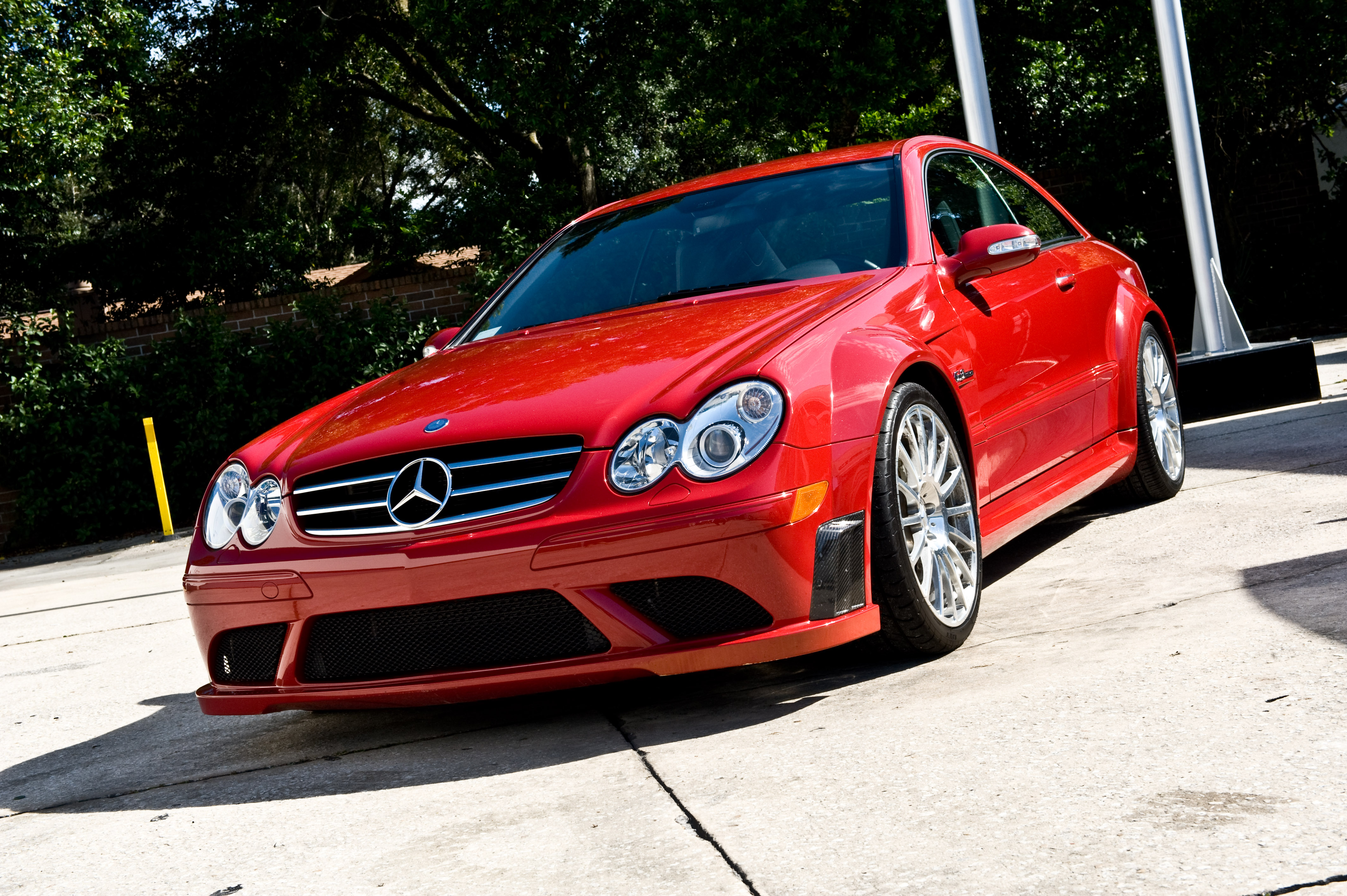 Мерцедес CLK 63 AMG Black Series.